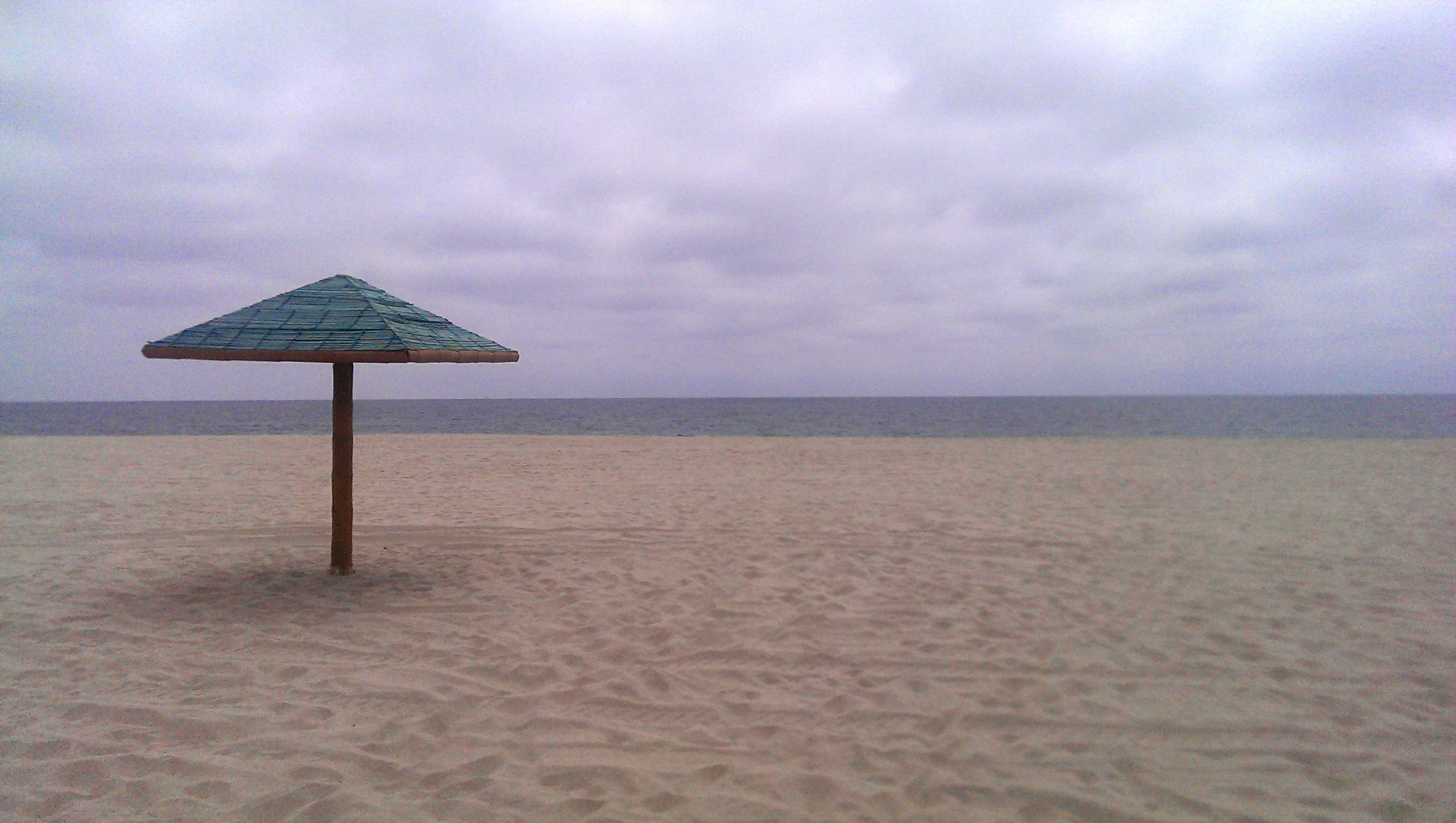 hosteria Amotape